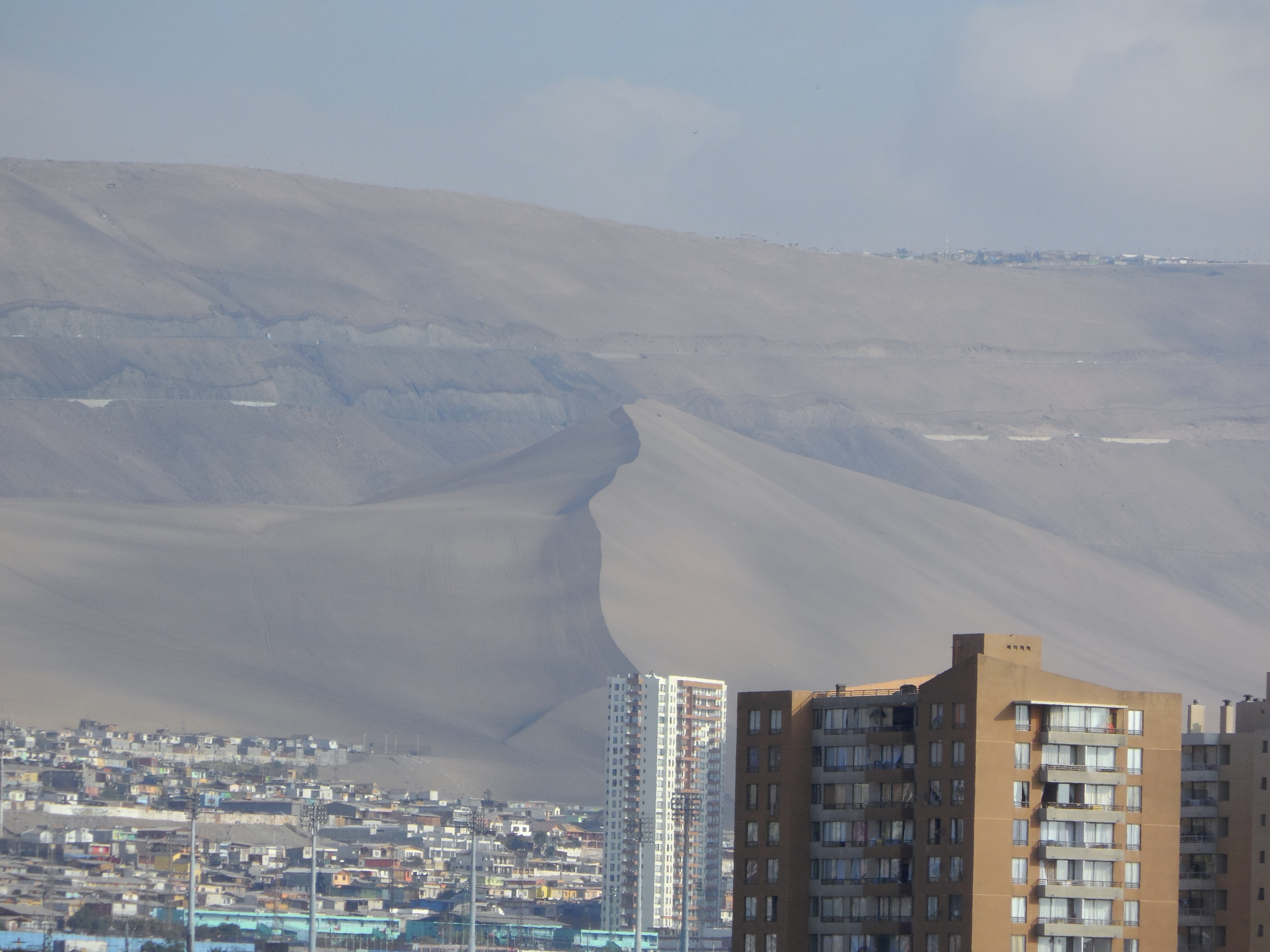 Vista Cerro Dragón, se aprecia el lomo del dragón, visto desde atrás (espinazo y cola), Iquique, I región.